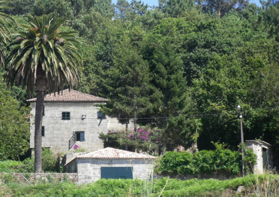 Pazo de Lamelas